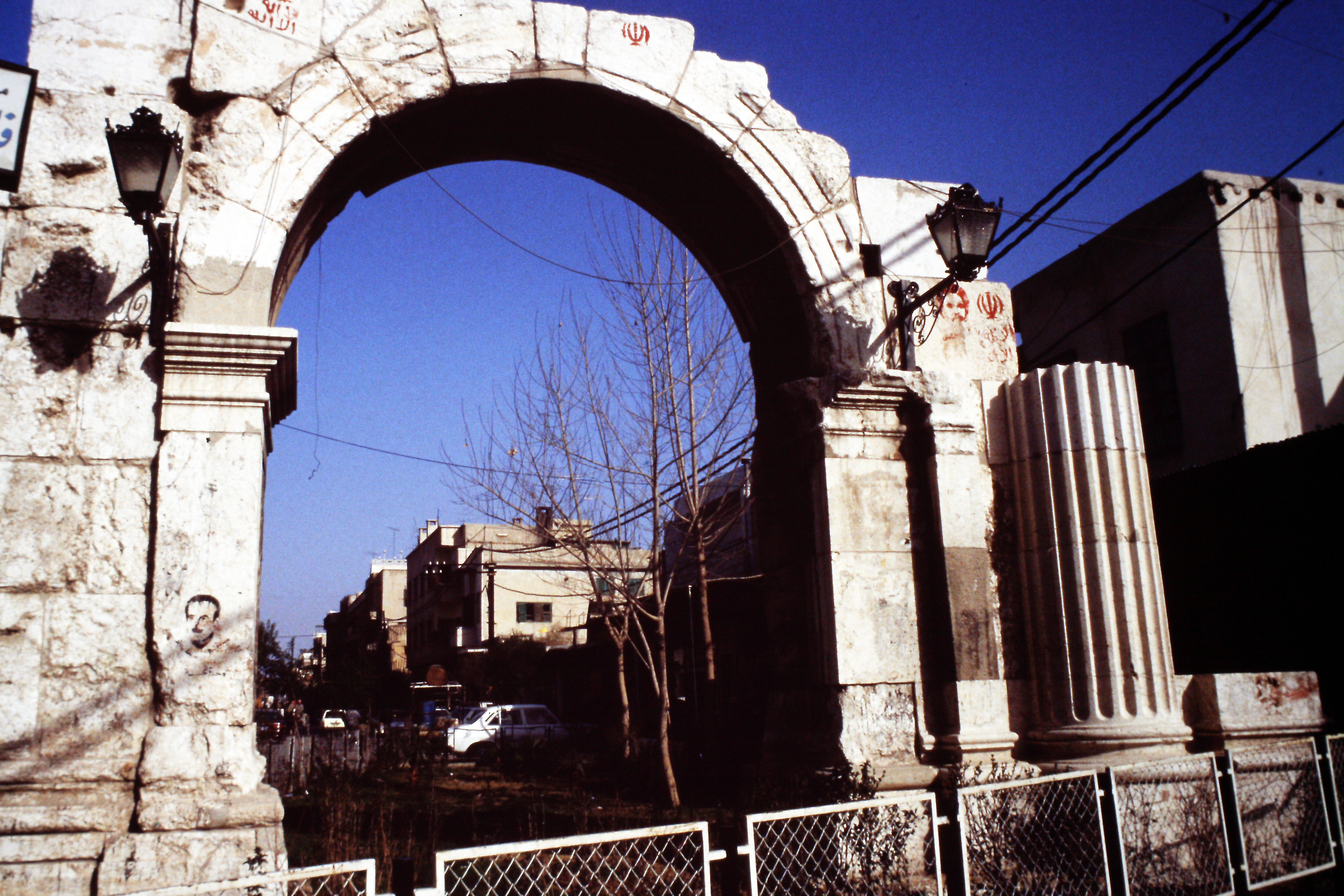 Arco romano, Damasco, 1993